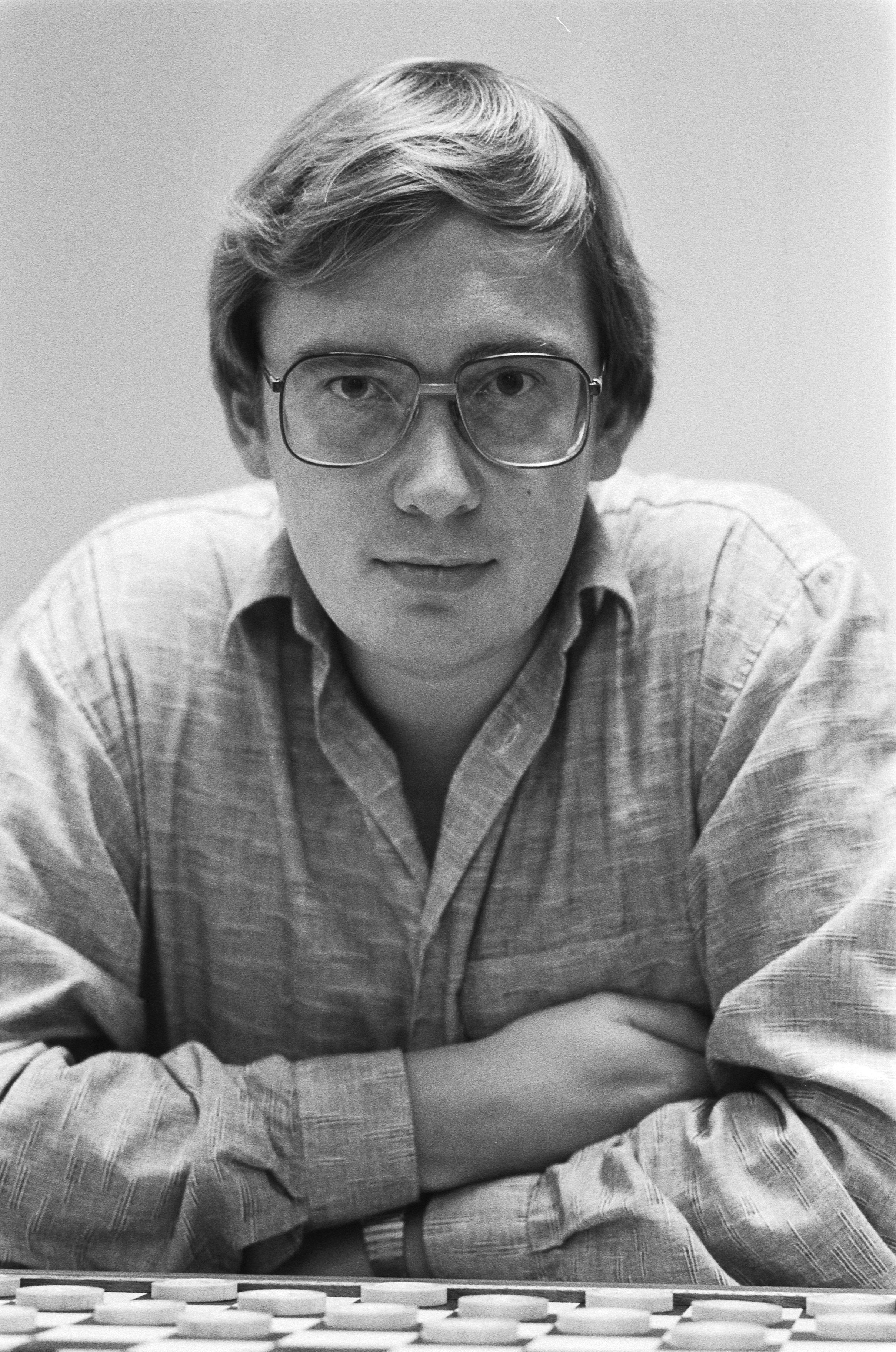 WK dammen in Dordrecht, 1e ronde; Clerc aan het dambord (close).